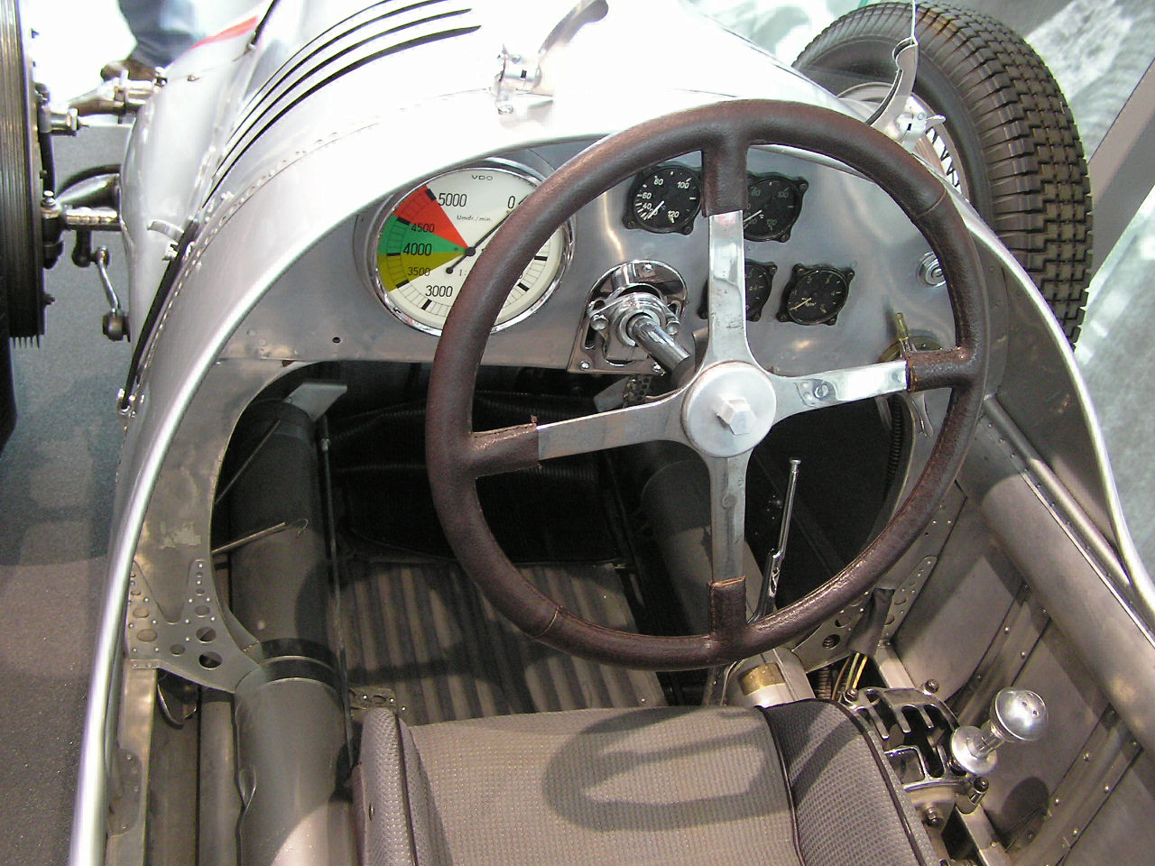 Armaturenbrett des Auto Union Typ D–Bergrennwagen, mit einem 16-Zylinder-Motor des Typs C.